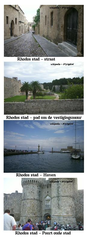 Foto's van Rhodos stad, eigenlijk zijn er nog veel meer mooie.... Zelf gemaakte foto's